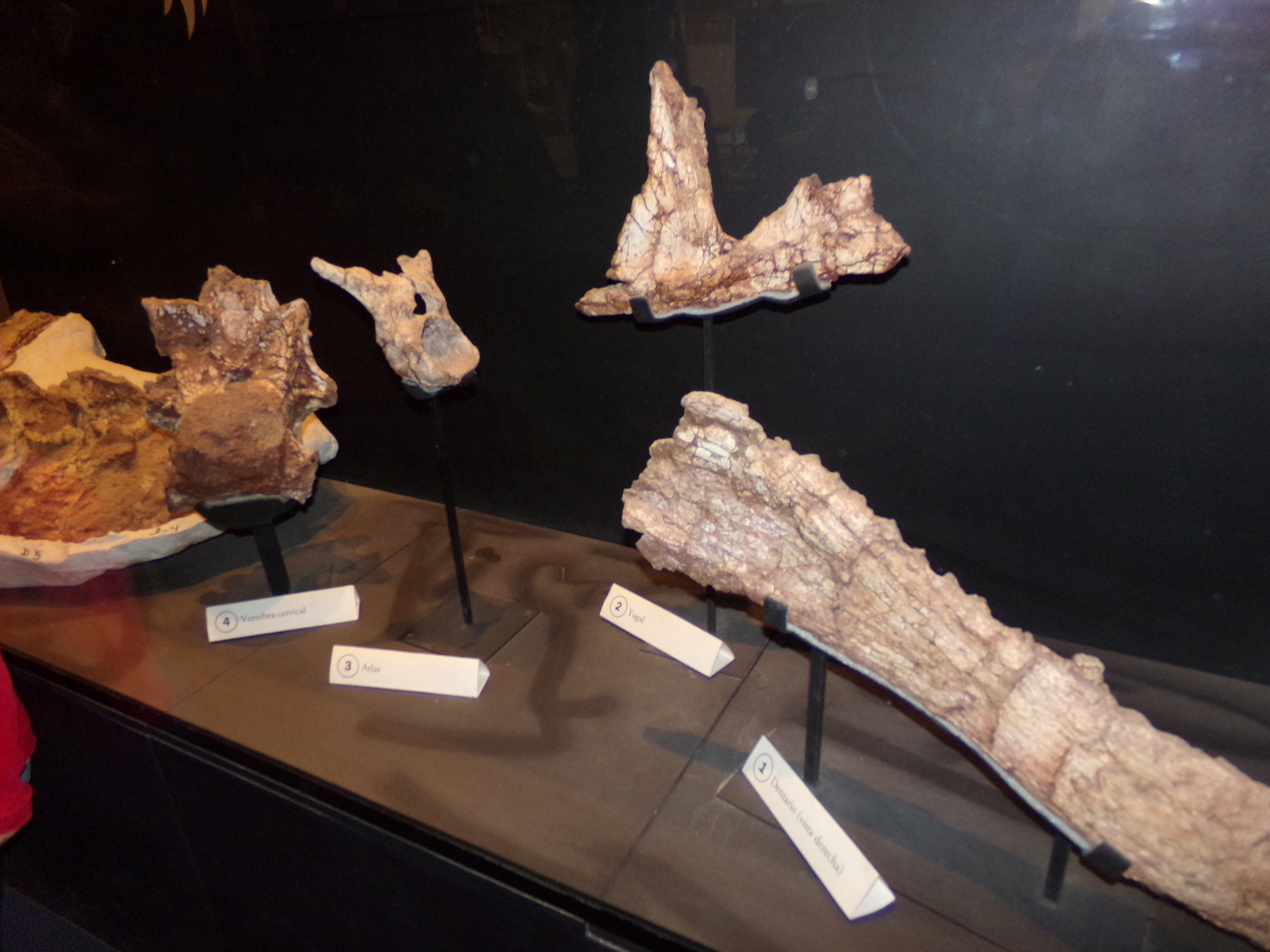 Tyrannotitan chubutensis, MEF Trelew